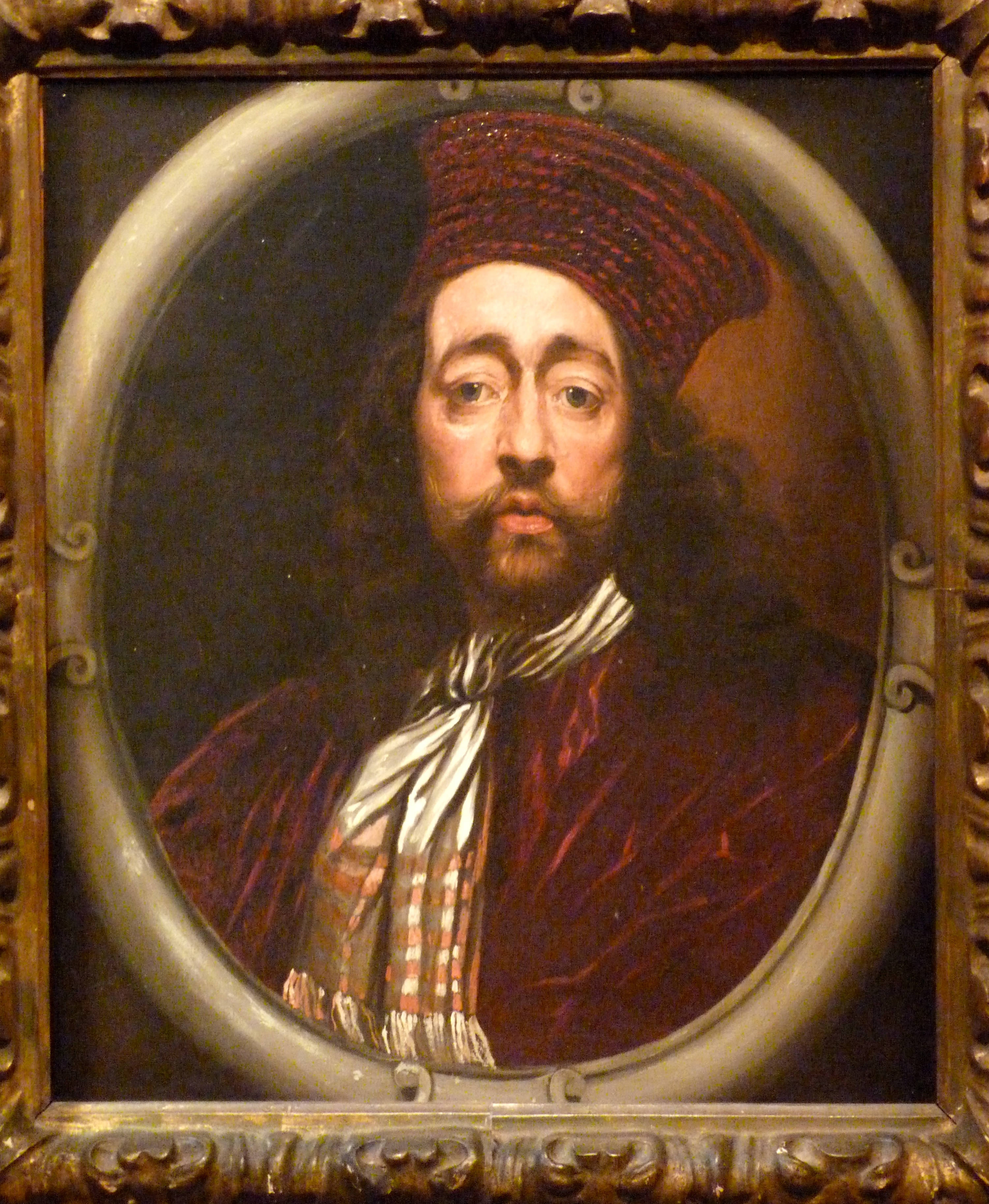 Self-portrait